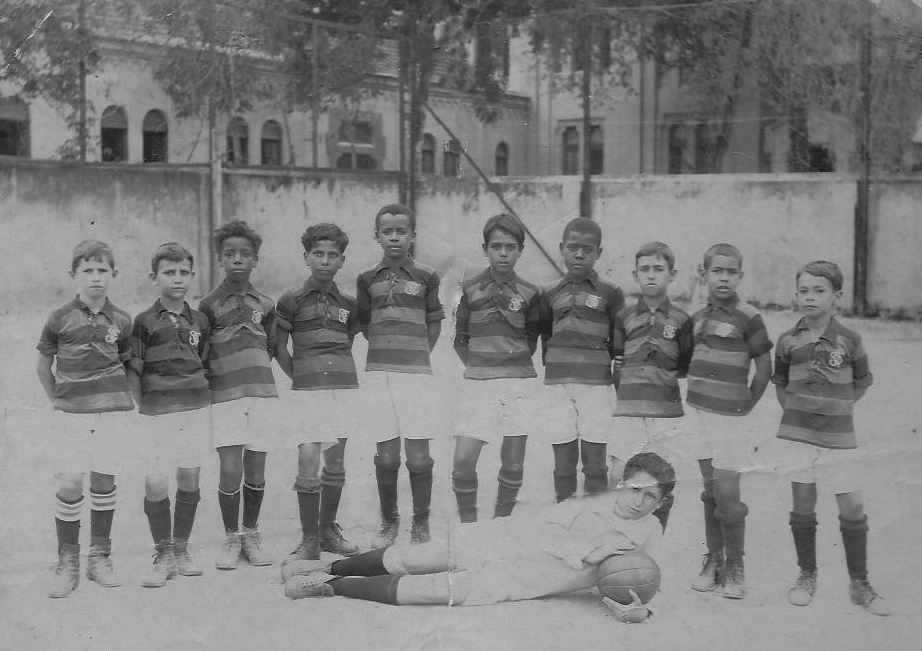 Português do Brasil: Time de futebol infantil